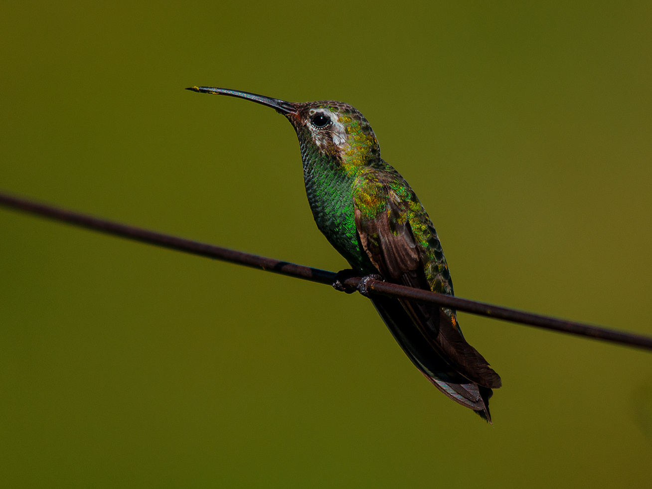 A ave havia acabado de pousar em uma cerca, após de alimentar do néctar das flores de uma árvore próxima. O registro foi efetuado na cidade de Terenos-MS. Trata-se de um macho.